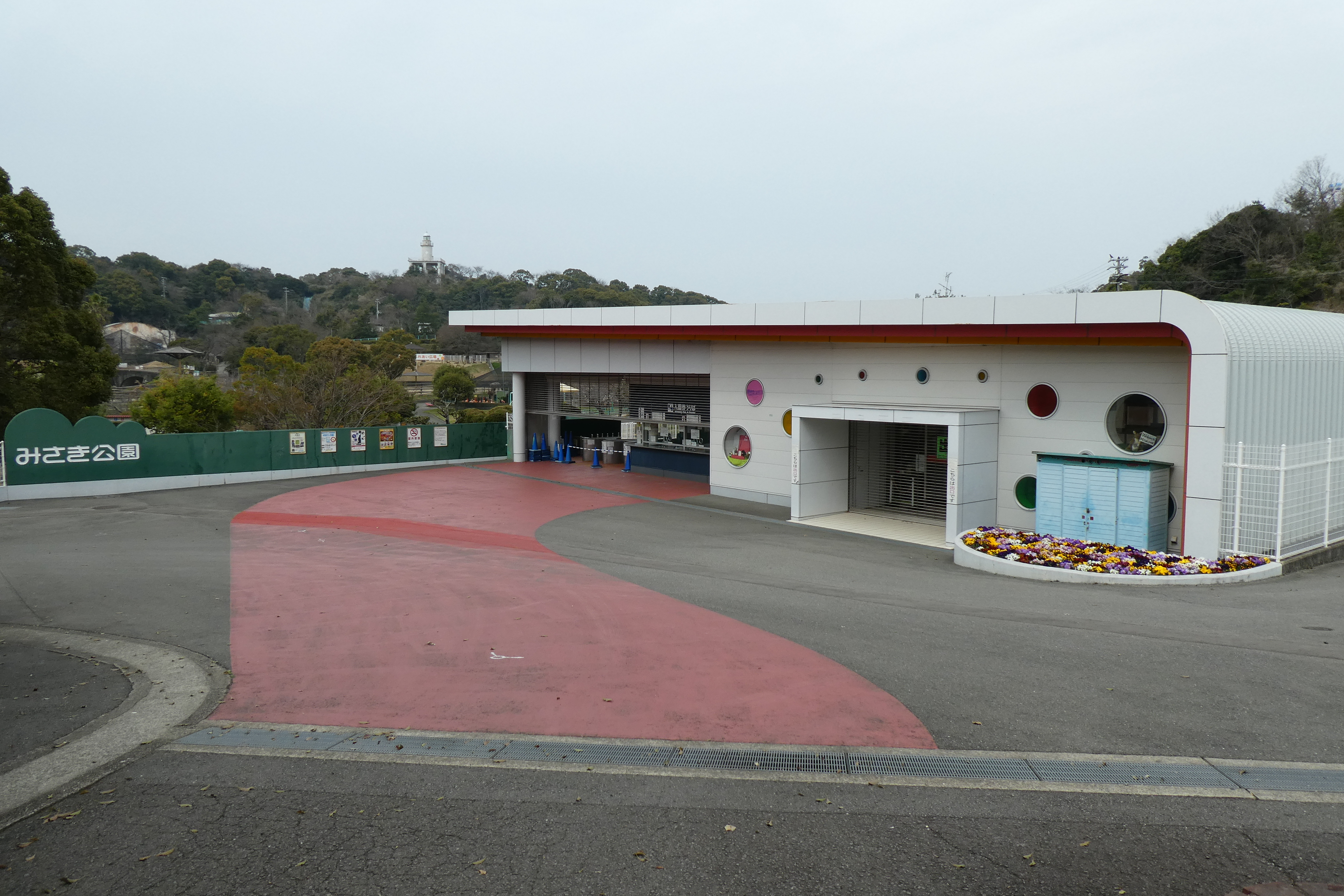 新型コロナウイルス感染拡大防止のため休園しているみさき公園。